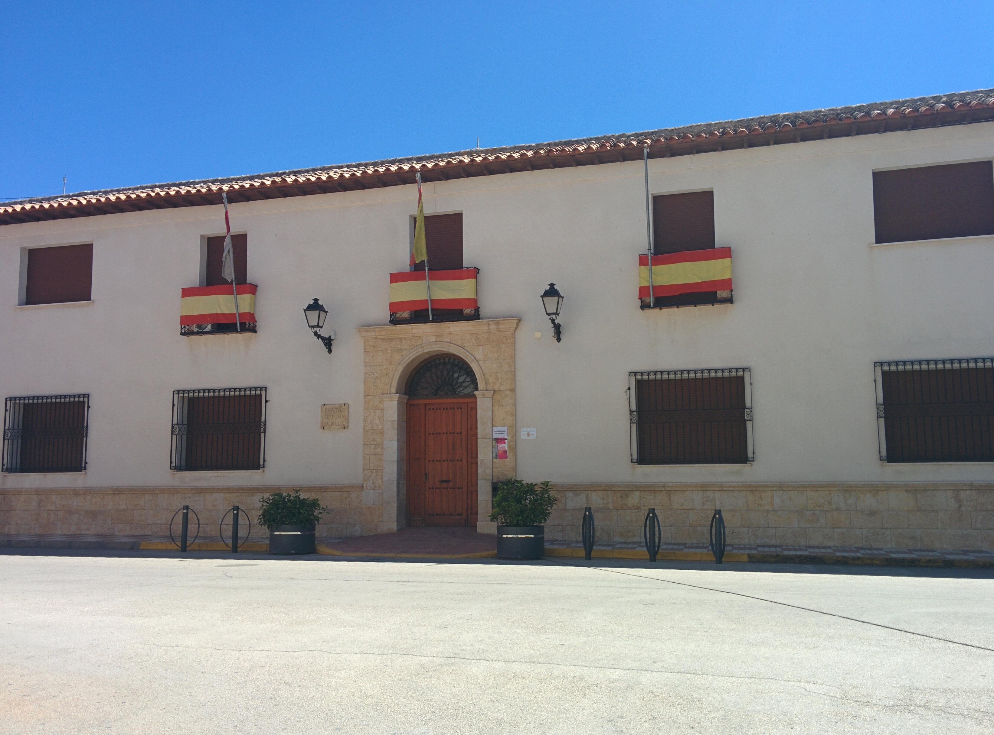 Centro Cultural de La Puebla de Almoradiel (Toledo, España).